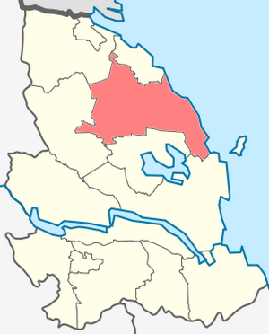 Ларионовское сельское поселение